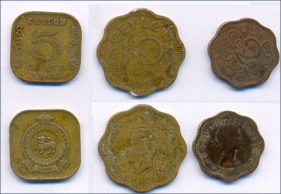 im aslam sultan im sell coin 1 rupees not indian sri lankan pakistan canada +94750814786